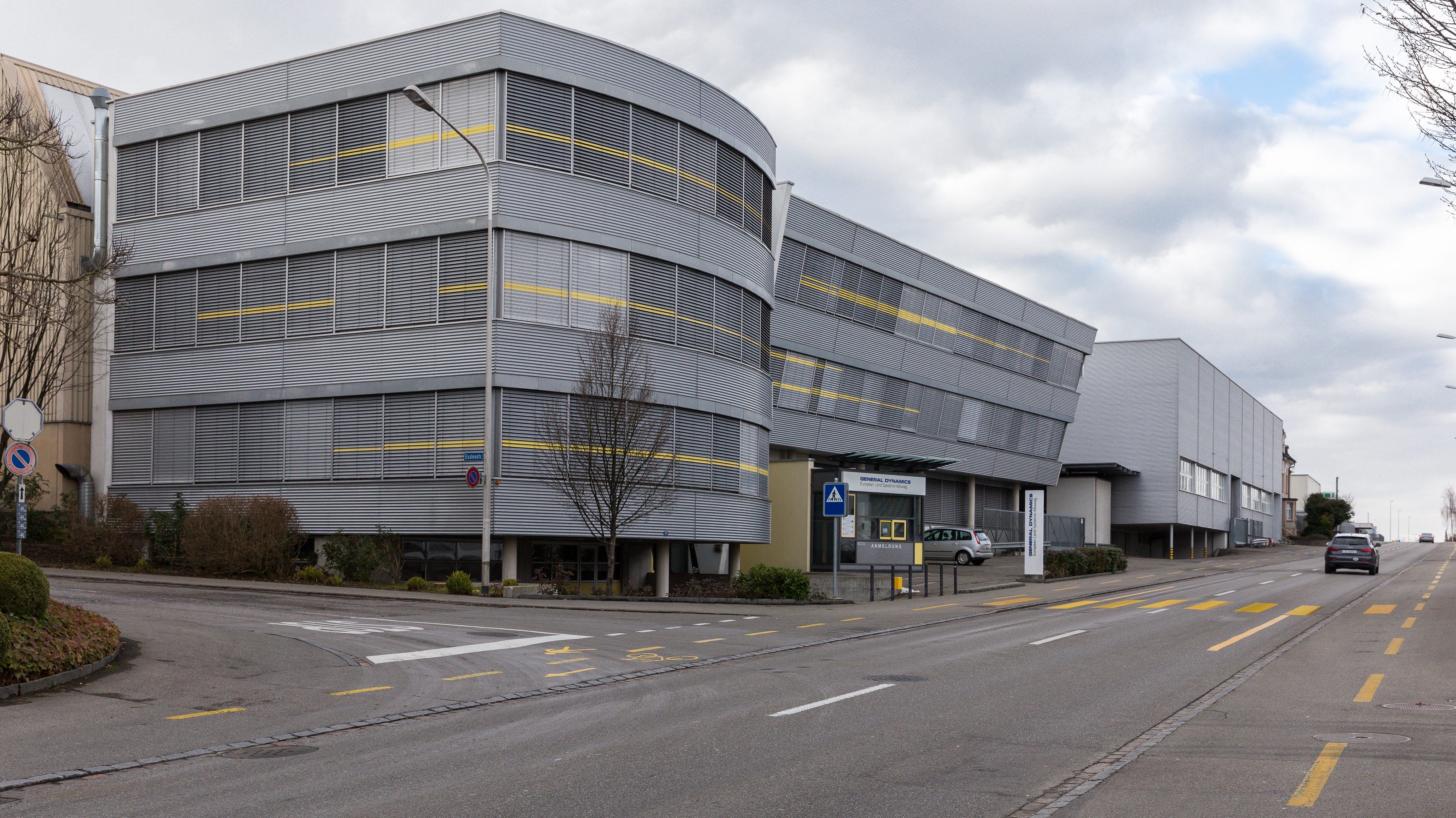 Gebäude der General Dynamics European Land Systems-MOWAG" in Kreuzlingen